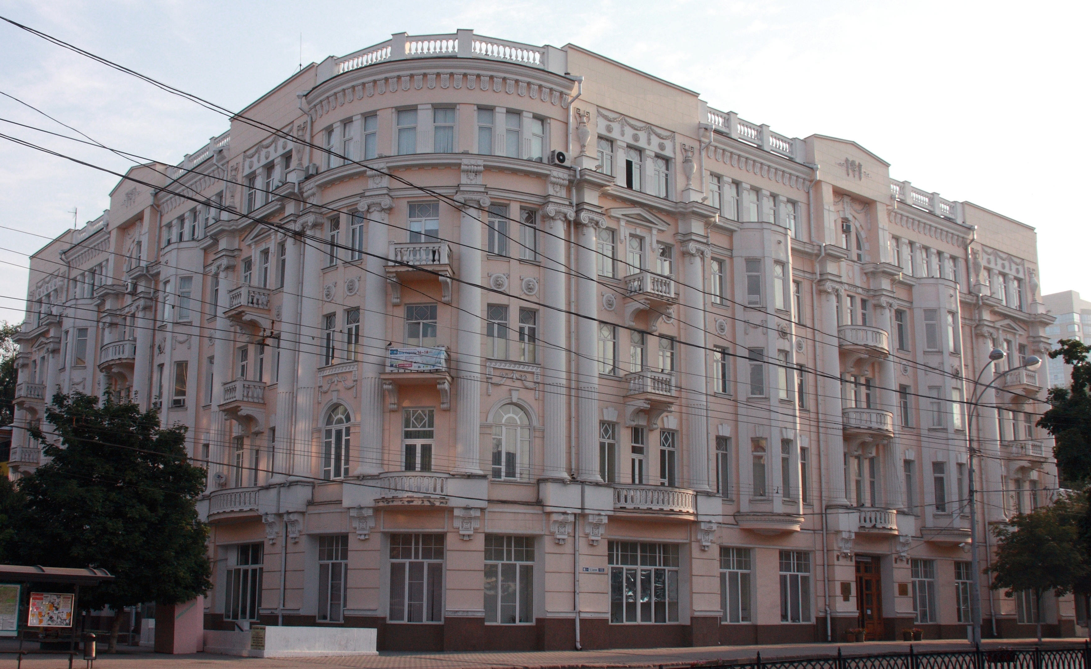 Южный Федеральный Университет